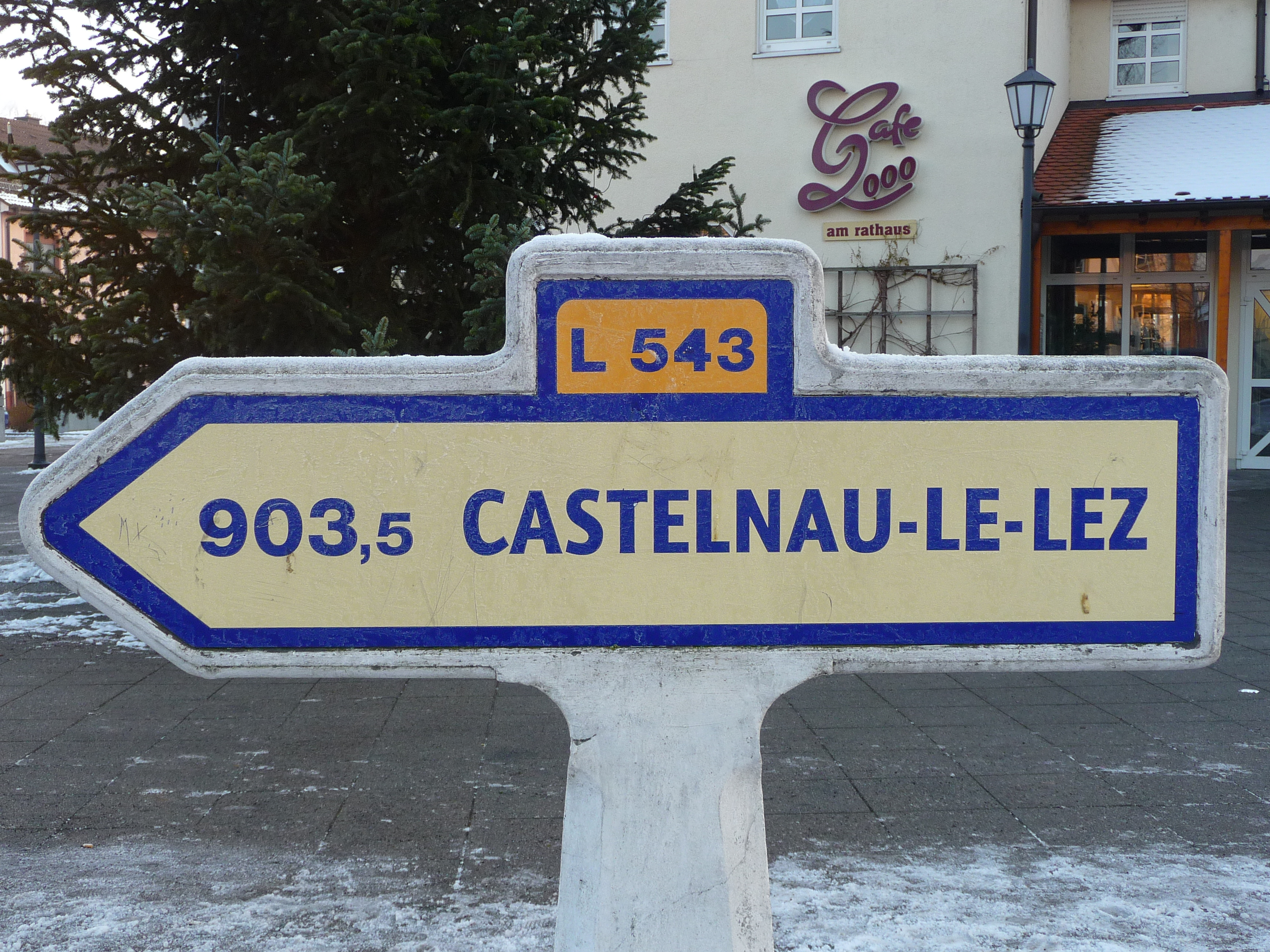 Plankstadt - Wegweiser auf die seit 1981 bestehende Partnerschaft mit der französischen Gemeinde Castelnau-Le-Lez